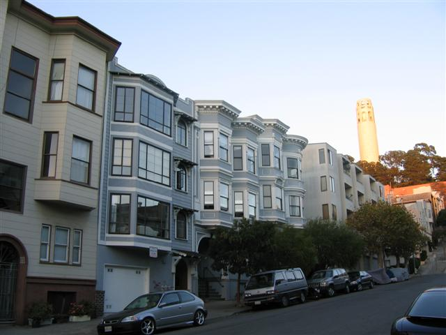 Типични къщи представители на викторианската архитектура характерна за Сан Франциско, щата Калифорния, САЩ. (авторска снимка) Снимката е направена в района на Кулата Койт, която се вижда на заден план, една от забележителностите на Сан Франциско.